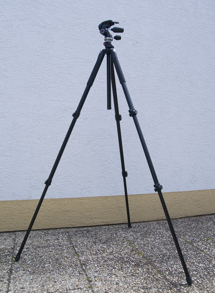 Manfrotto Stativ 055 XPROB